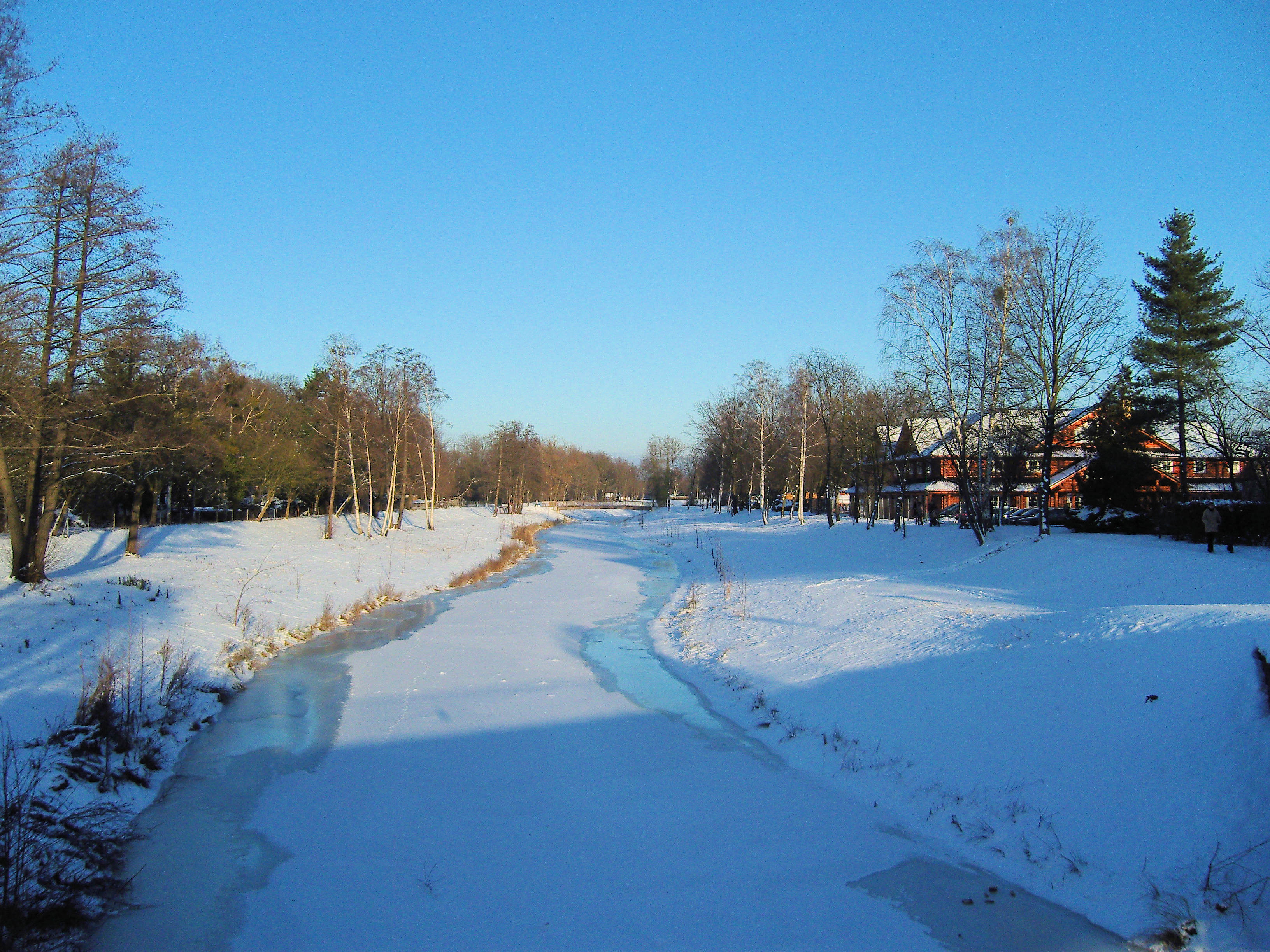 Schwarze Elster bei Senftenberg im Winter, aufgenommen von der Brücke beim Wasserverband (Brücke am Steindamm)